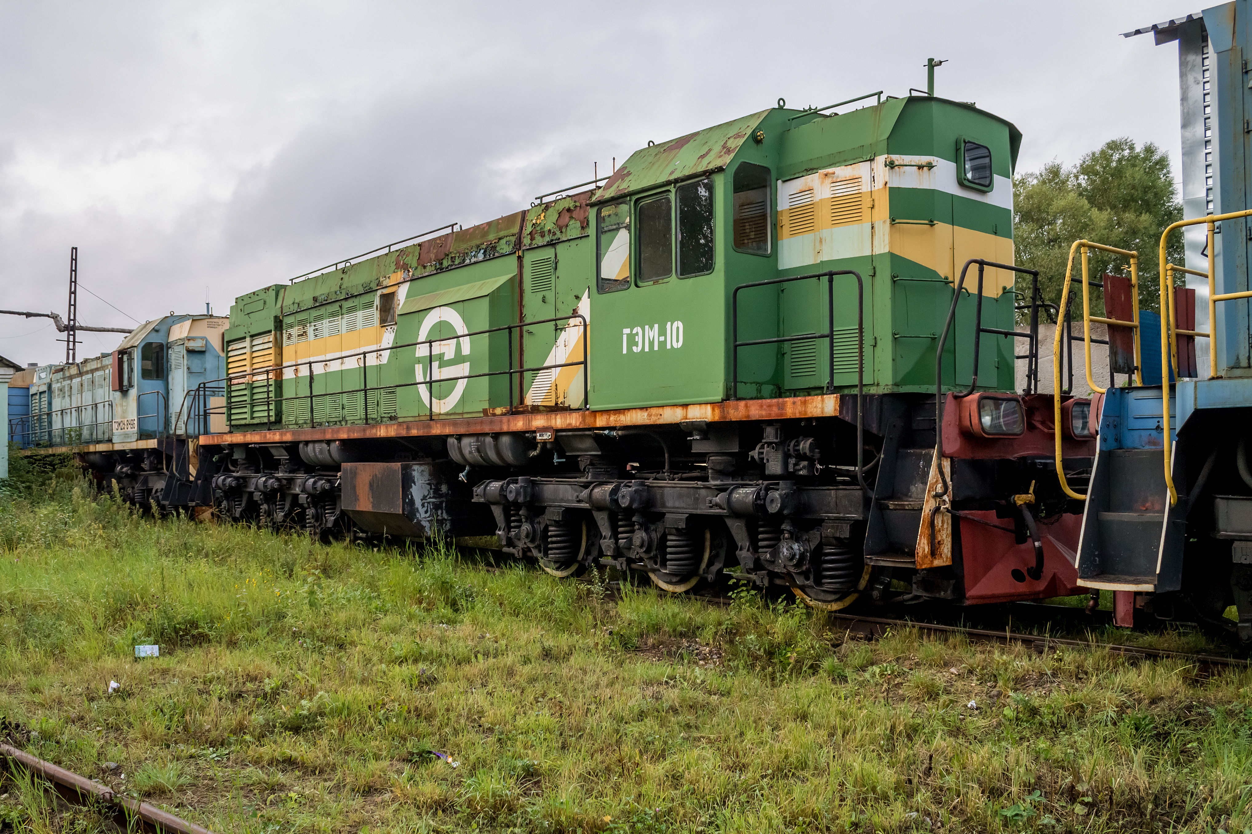 ГЭМ10 см. фото 704288 в альбоме автора